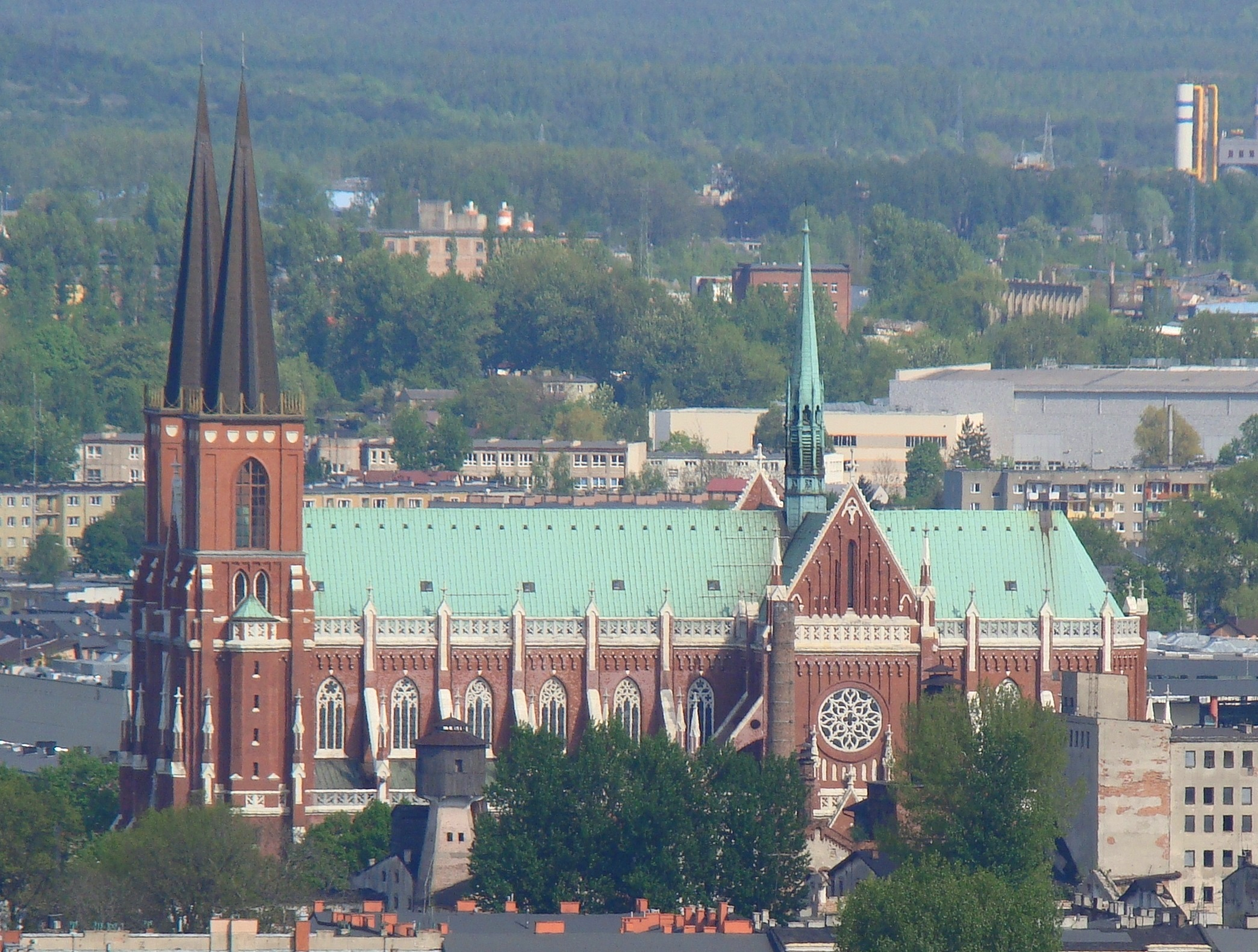 Częstochowa, kościół katedralny pw. Św. Rodziny